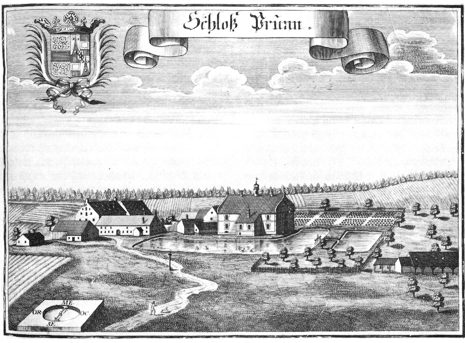 Kupferstich von Michael Wening (1701): "Schloß Prunn", heute Schönbrunn, Ortsteil von Denkendorf im Landkreis Eichstätt/Bayern